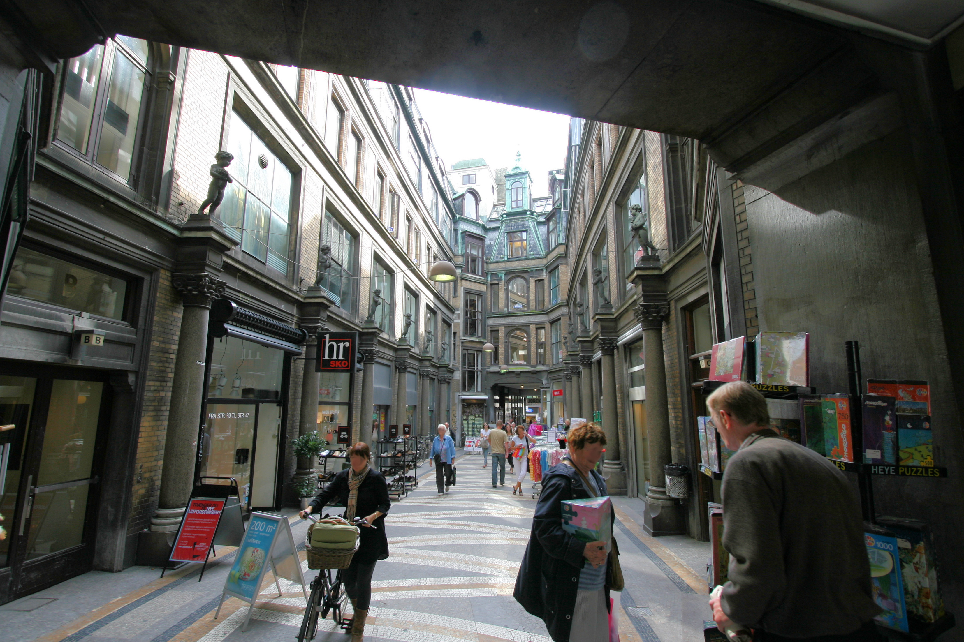 Jorcks Passage in Copenhagen. Seen from the Skindergade end.